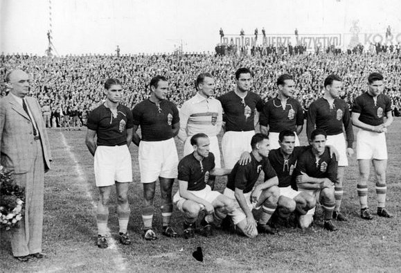 Lengyelország-Magyarország labdarúgó barátságos mérkőzés (Varsó) Nézőszám: 21 000. Játékvezető: Esko Pekkonen (FIN) Magyarország: Sziklai Ferenc,Kis Károly, Bíró Sándor,Szalay Antal, Turay József, Dudás János,Ádám Sándor, dr. Sárosi György, Zsengellér Gyula, Toldi Géza, Gyetvai László. Szövetségi kapitány: Ginzery Dénes.